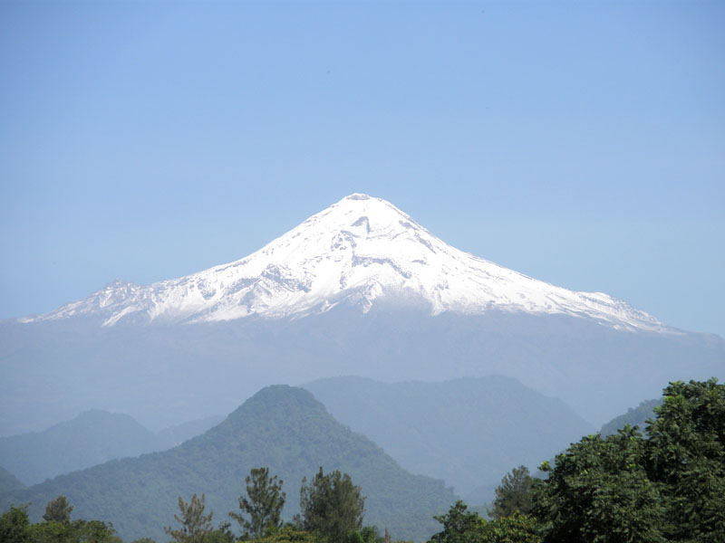 Imagen Volcán Citlaltepetl — desde Carretera Federal Fortin-Coscomatepec, México.